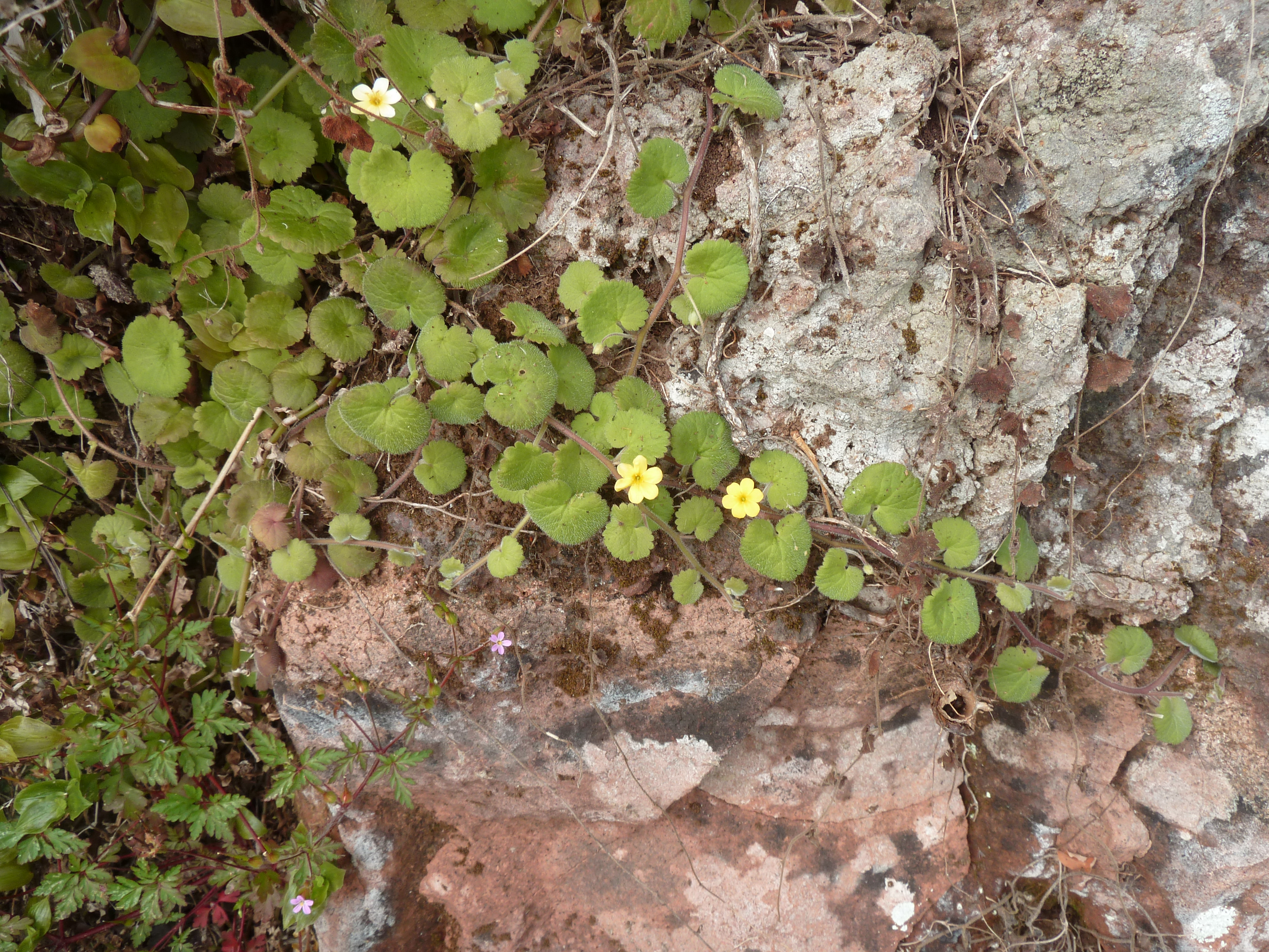 Sibthorpia peregrina, Ile de Madère